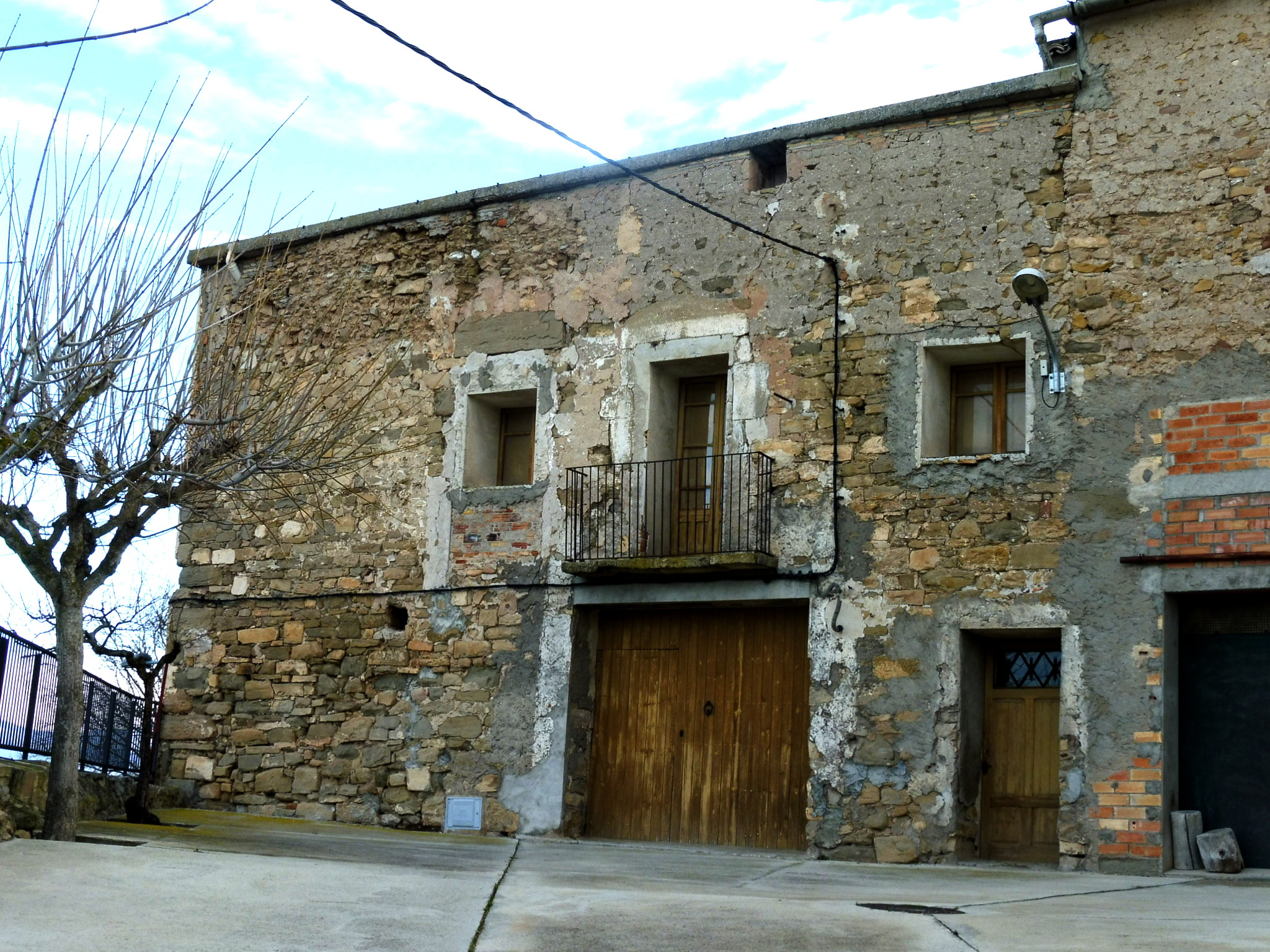 El Castellot de Marcovau (Foradada): façana de ponent